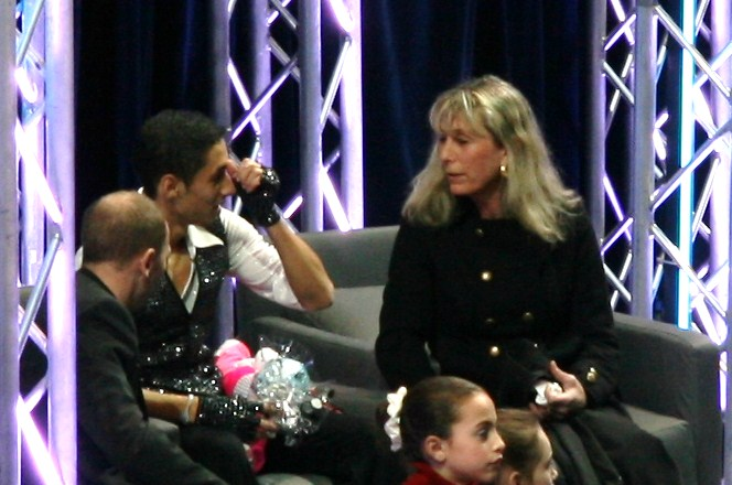 Chafik Besseghier and his coaches Véronique Cartau-Treille and Françoise Bonnard at the 2010 Trophée Eric Bompard